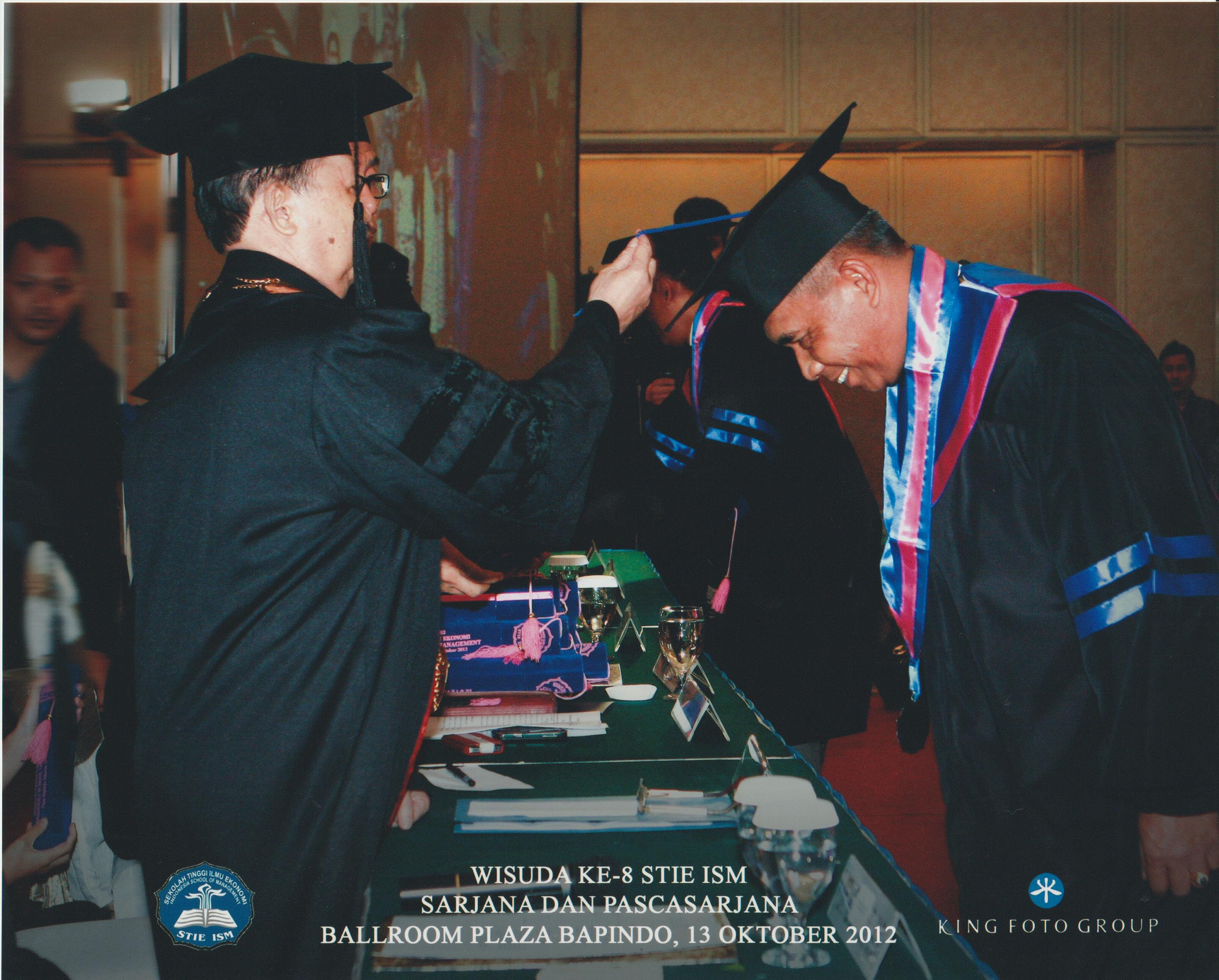 Wisuda STIE ISM